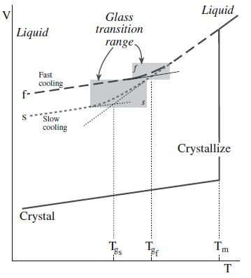 تفاوت تغییرات حجم بر حسب دما را در دوماده،یکی با انجماد کریستالی و دیگری با انجماد شیشه ای نشان میدهد